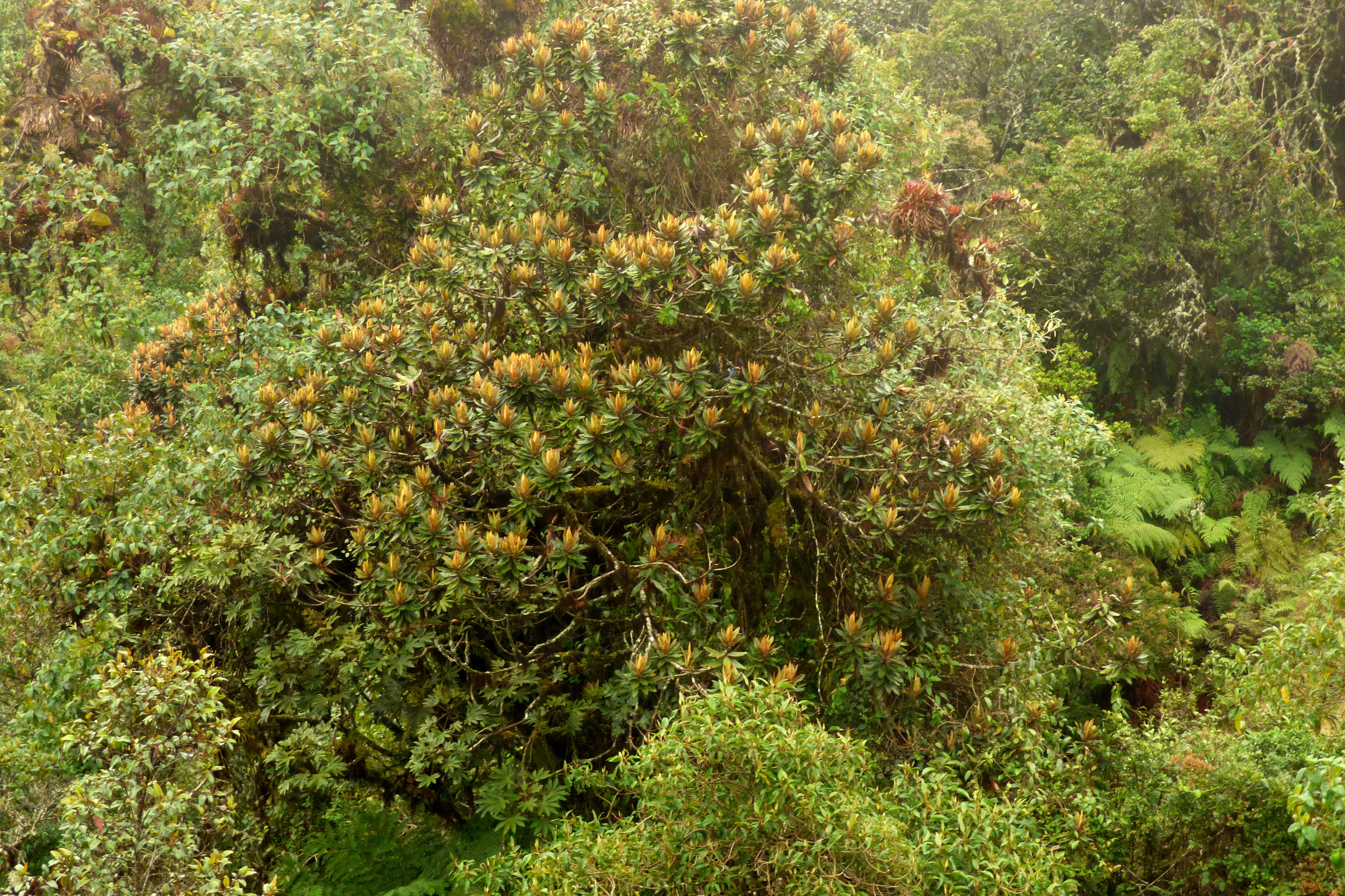 Laurel dorado (Ocotea sericea) en Colombia.